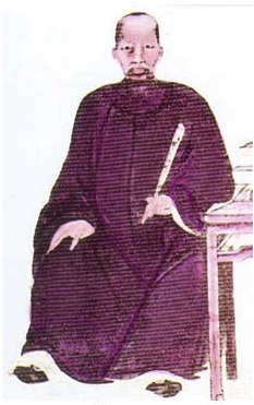 Tranh chân dung Phan Huy Ích (1751 - 1822), vẽ trên lụa. Ông là một viên quan nhà Lê trung hưng và là công thần của nhà Tây Sơn. Tranh vẽ năm 1790, hiện đặt tại nhà thờ họ Phan Huy.